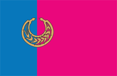 прапор Нікопольского району